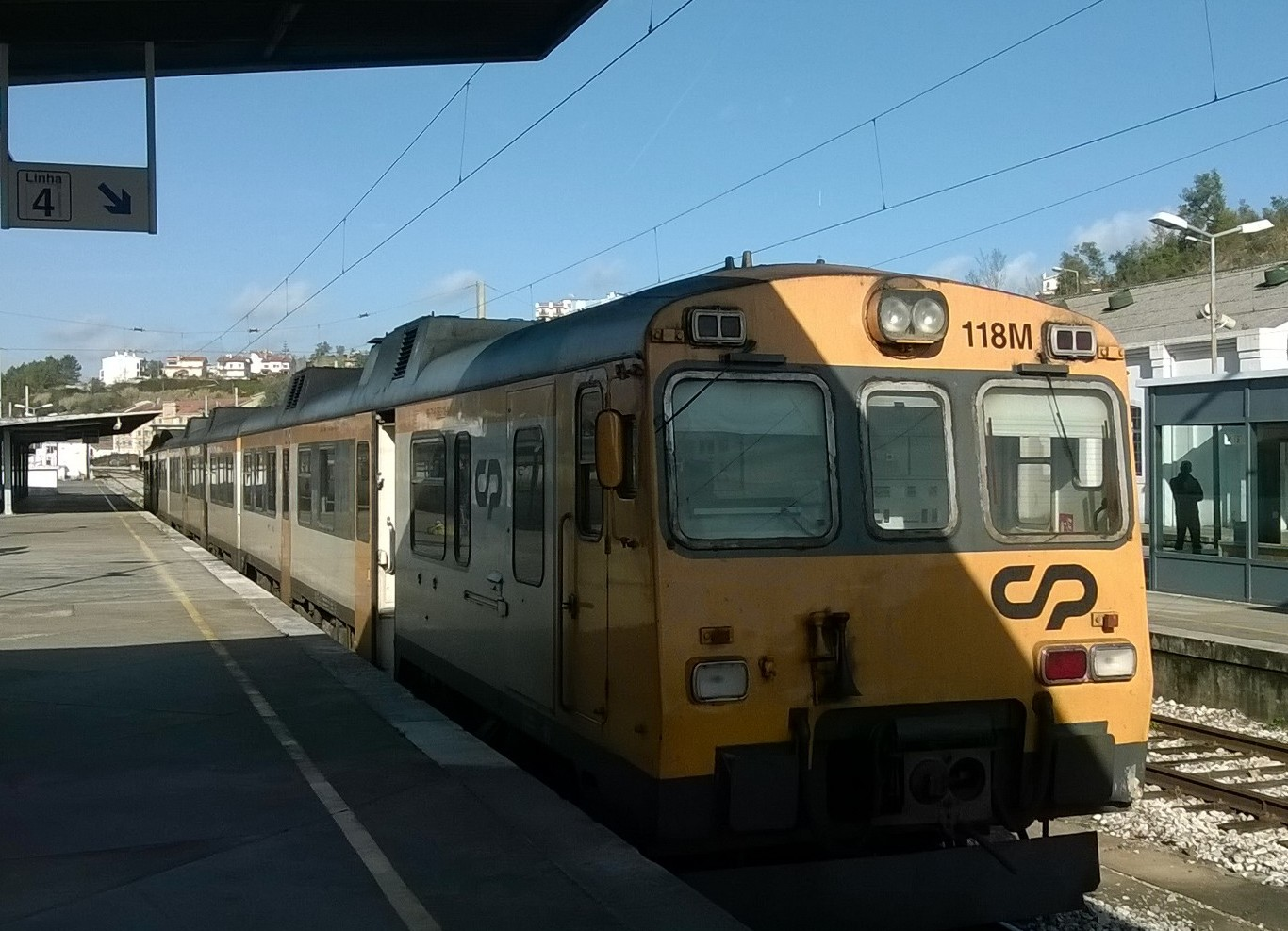 Composição na estação Coimbra-B, em Portugal.